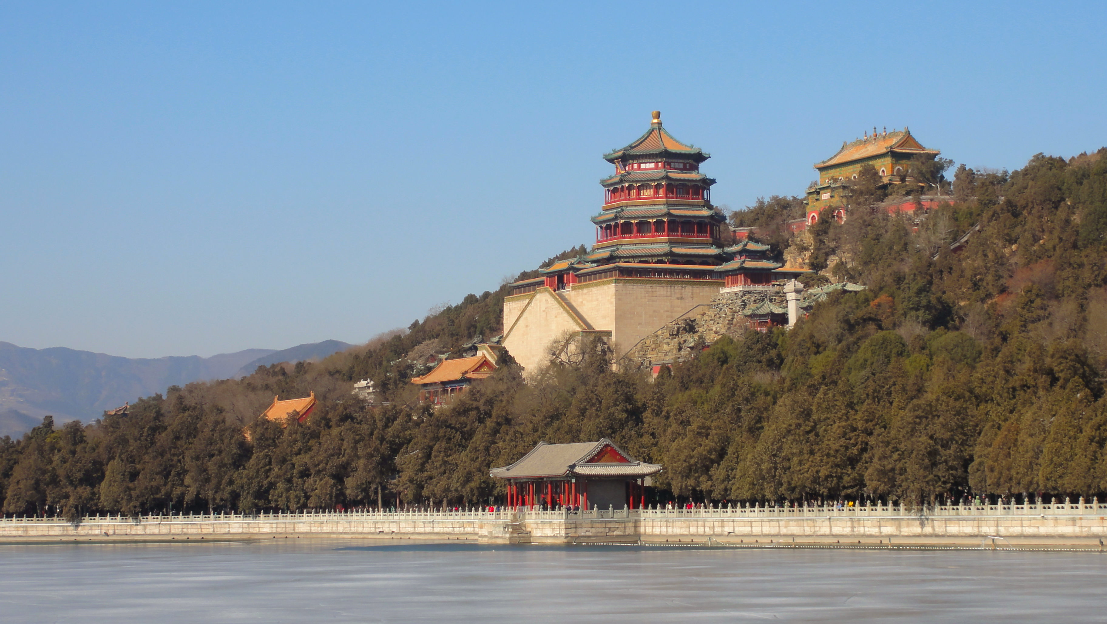 Residence dete